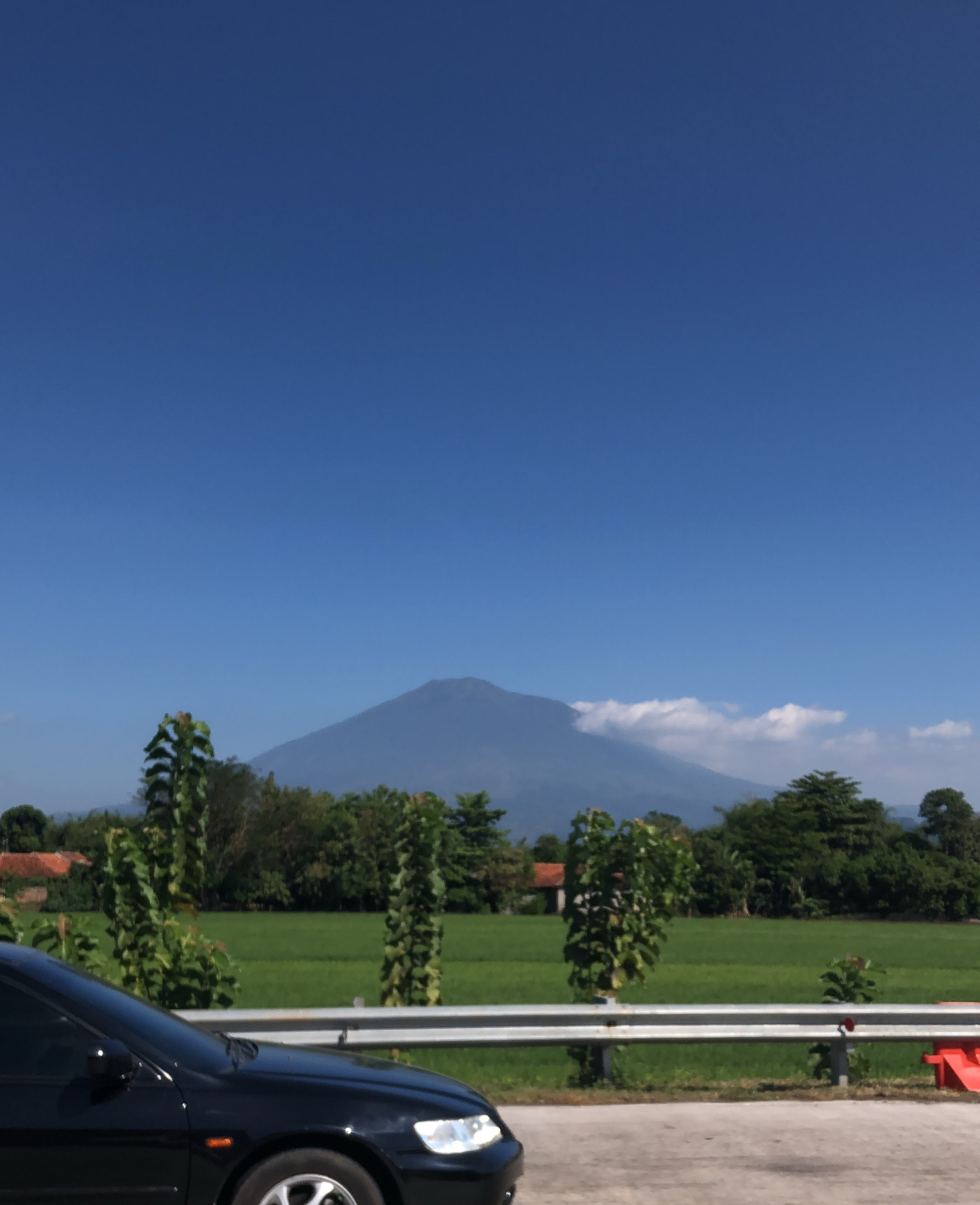 ung Ciremai Merupakan Gunung berapi yang terletak tiga kabupaten yaitu Majalengka, Kuningan, dan Cirebon. gunung ini tidak ada tanda-tanda meletus dalam waktu 6 Dekade. Namun pernah terjadi Gempa Tektonik tidak dirsertai letusan